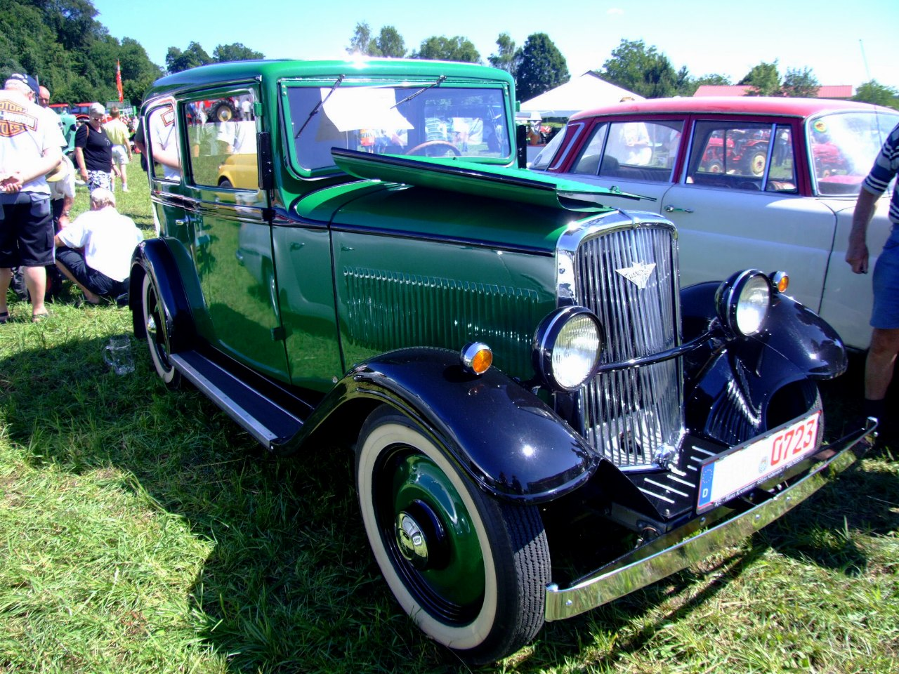 Hanomag Kurier 1089ccm 23PS 1935